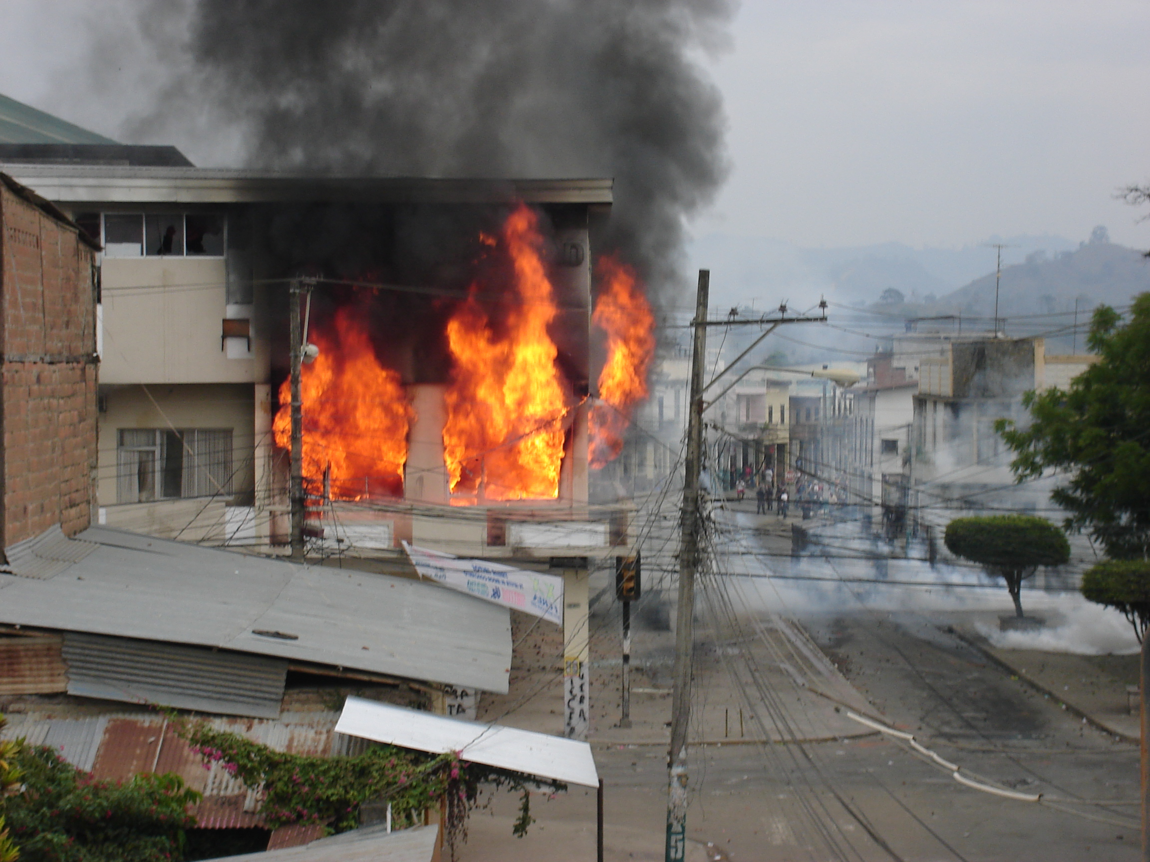 Incendio del Palacio Municipal de Chone (Ecuador) en medio de protestas